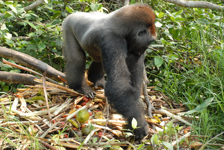 Gorilla gorilla gorilla, Congo